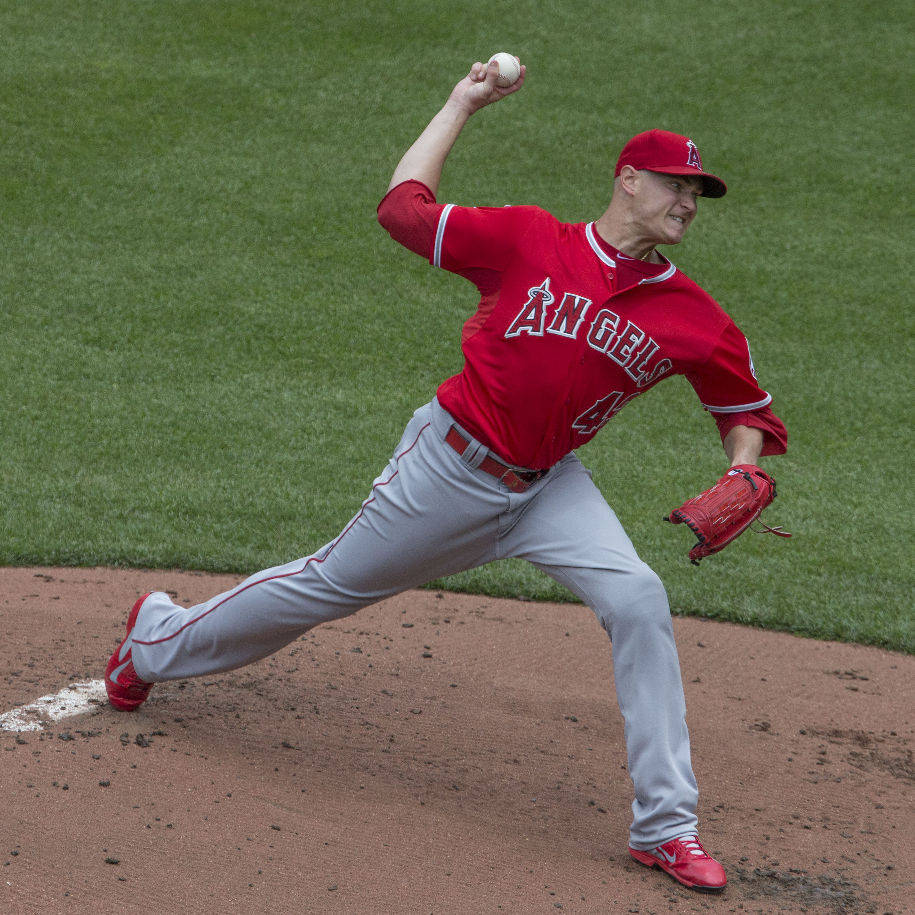 Garrett Richards